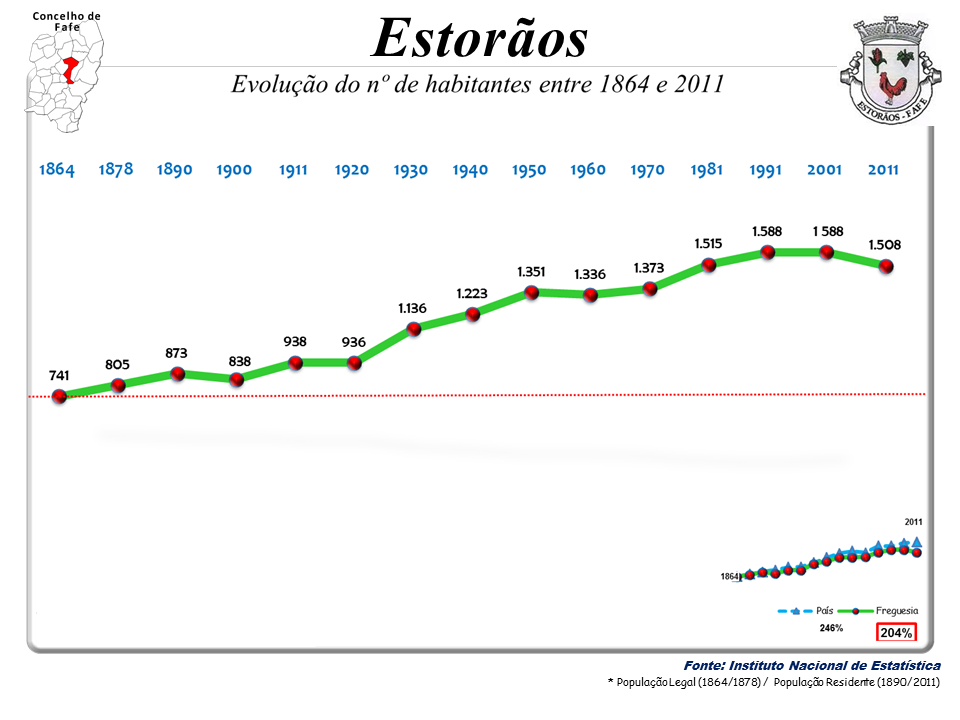 Censos 1864/2011